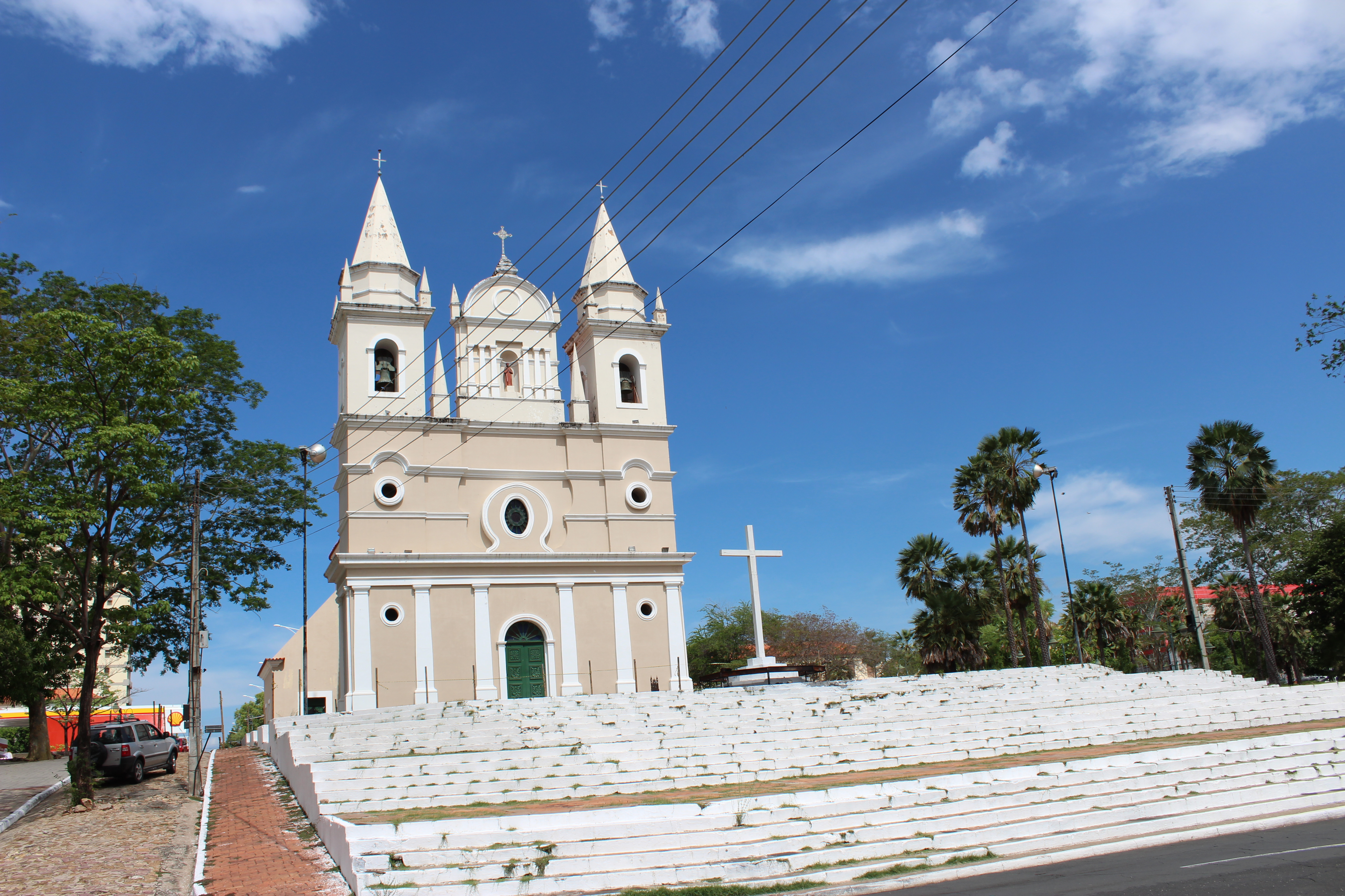 Imagem da frente do templo da Igreja São Benedito, em Teresina, no Piauí.